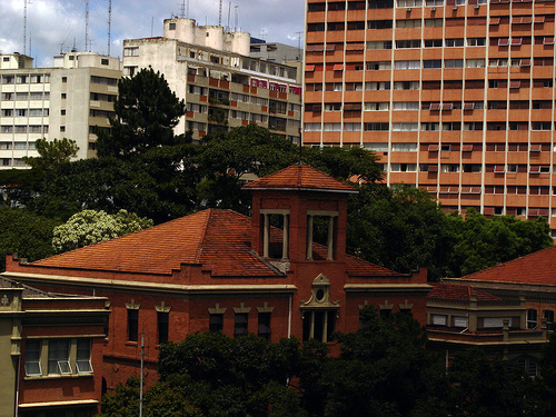 Prédio 3, da Faculdade de Direito